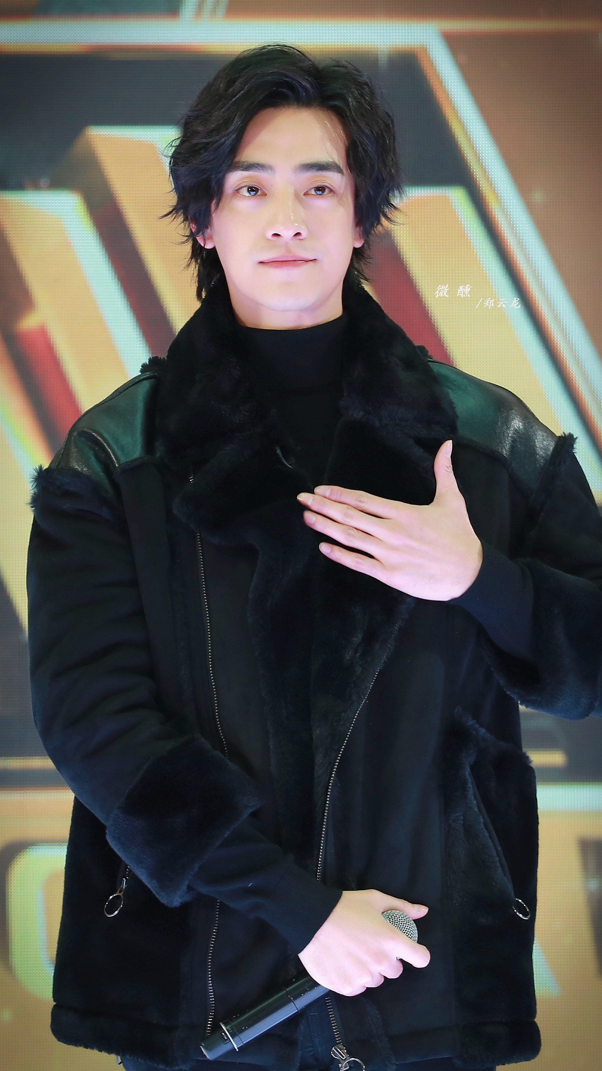 郑云龙2019长沙见面会by微醺|郑云龙